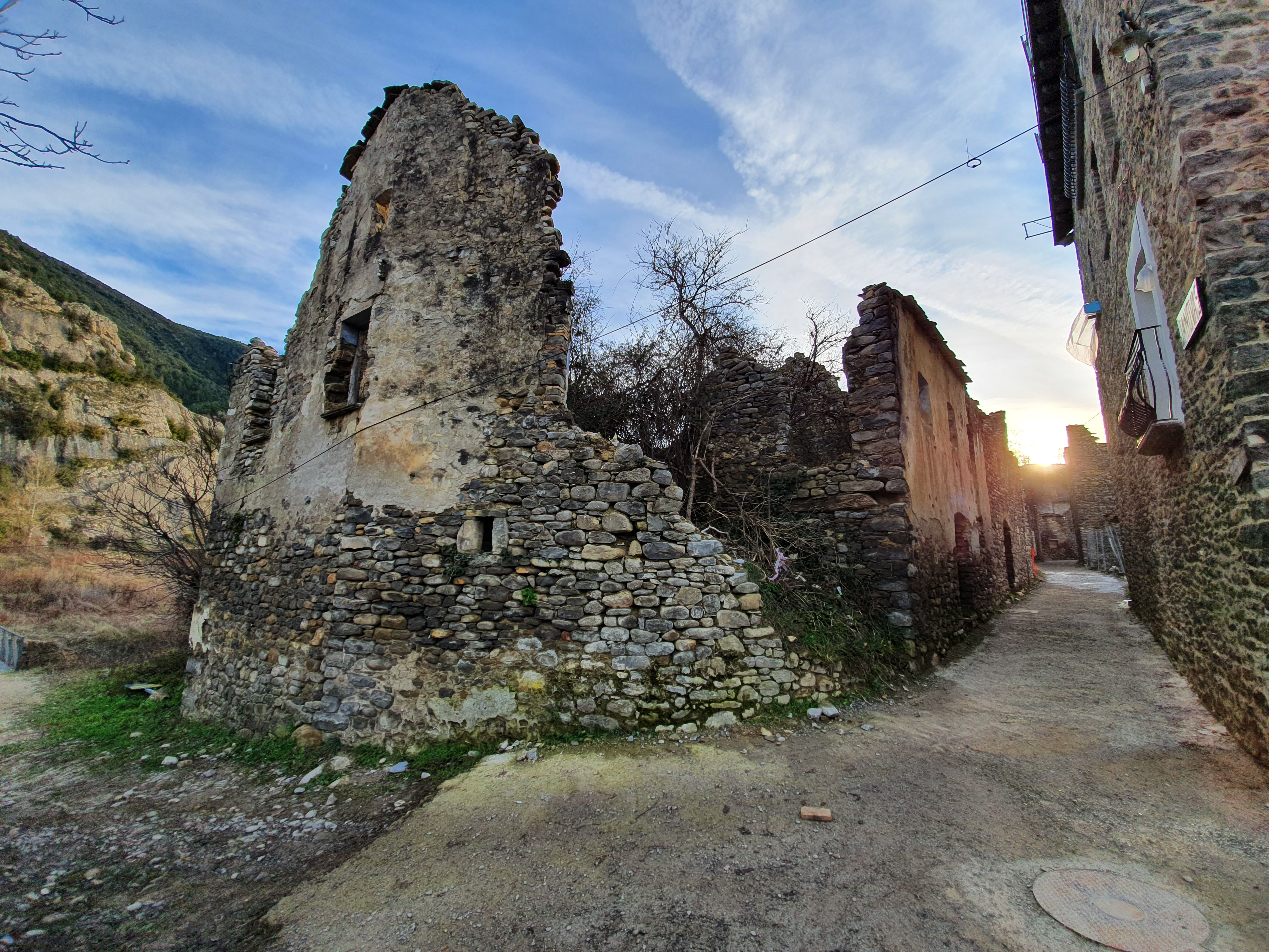 Jánovas